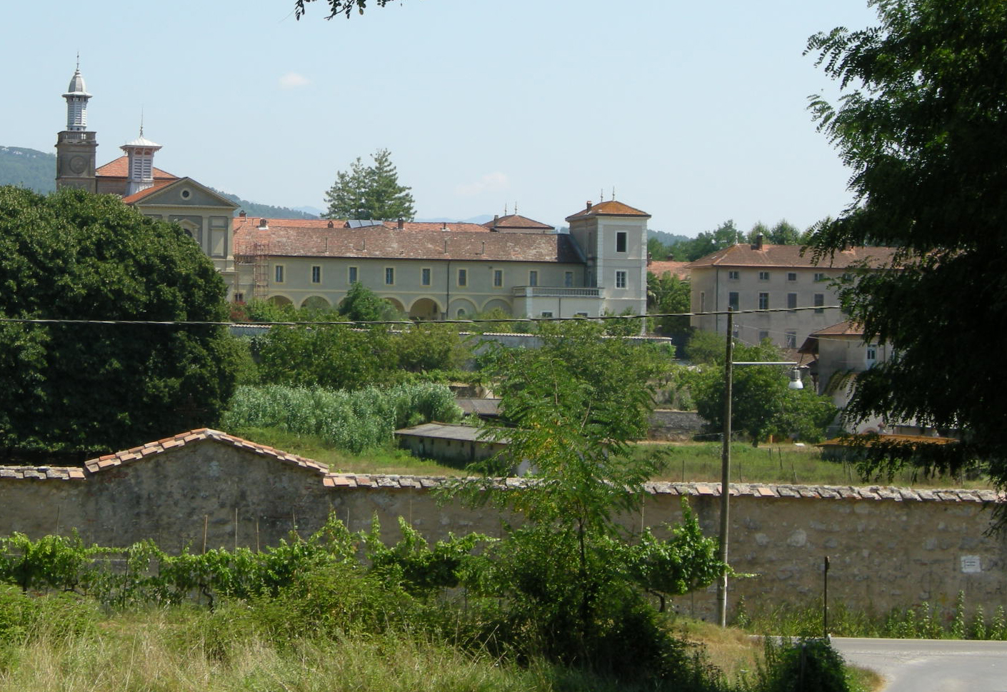 Certosa di Farneta, view